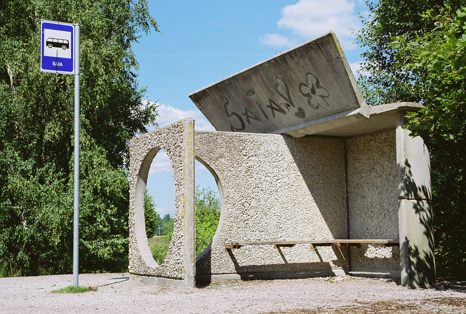 Saia busstop in Saaremaa, 2006